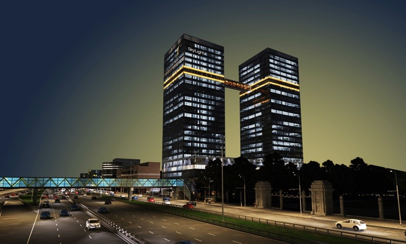 Москва, БЦ SkyLight, Центральный офис Мэйл.ру. Трёхмерный рендринг.